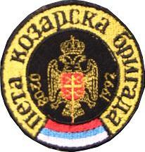 Амблем Пете козарске бригаде